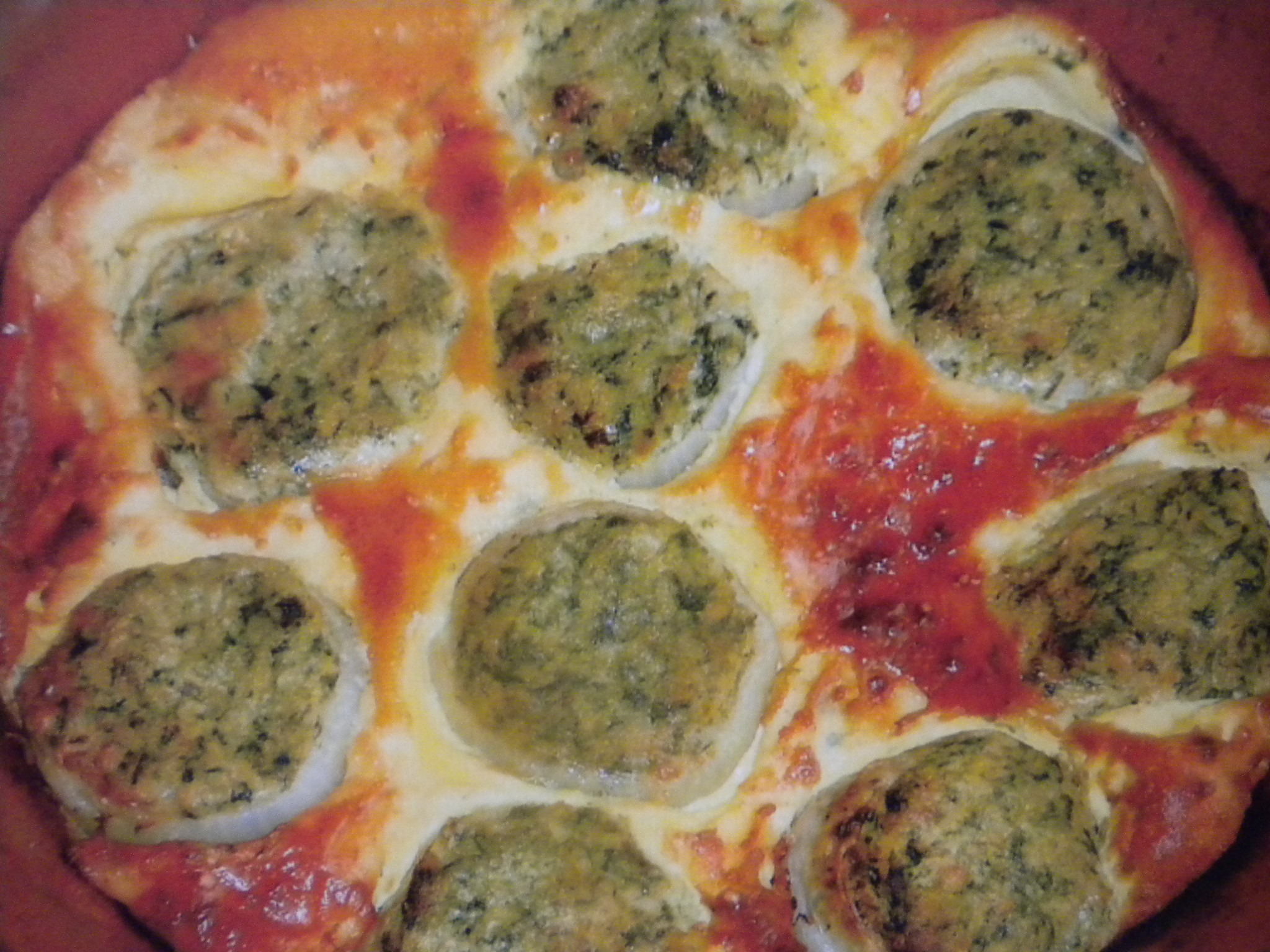 Piatto tipico Vernante